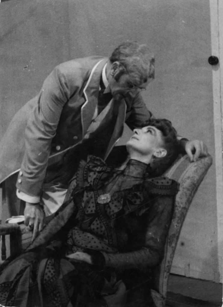 Lojze Drenovec kot Aleksej pl. Gornik in Sava Sever kot Helena Gruden. Ivan Cankar, Za narodov blagor, Drama SNG v Ljubljani, 1945.